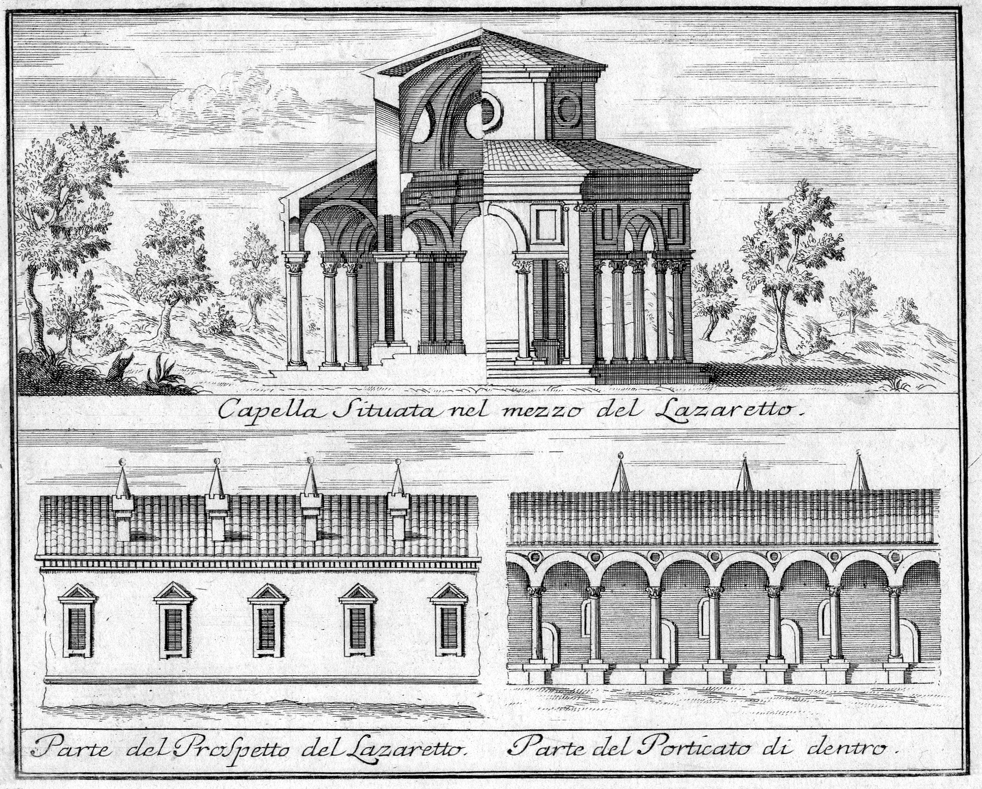 Capella Situata nel mezzo del Lazaretto / Parte del Prospetto del Lazaretto / Parte del Porticato di dentro